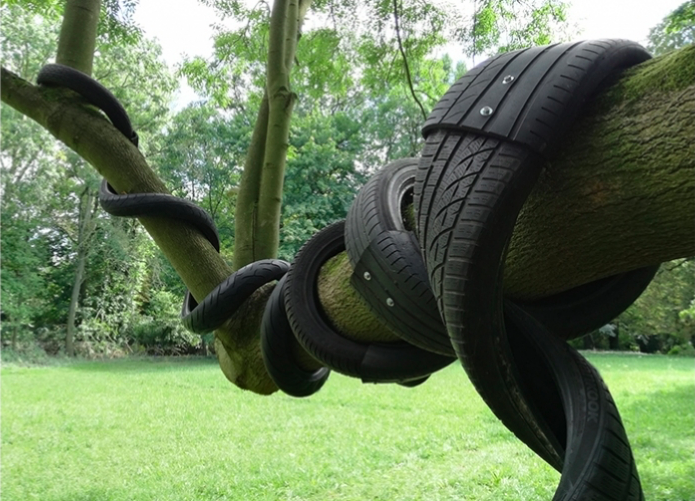 Skulptur in Gruppenausstellung in Hannover-Ricklingen